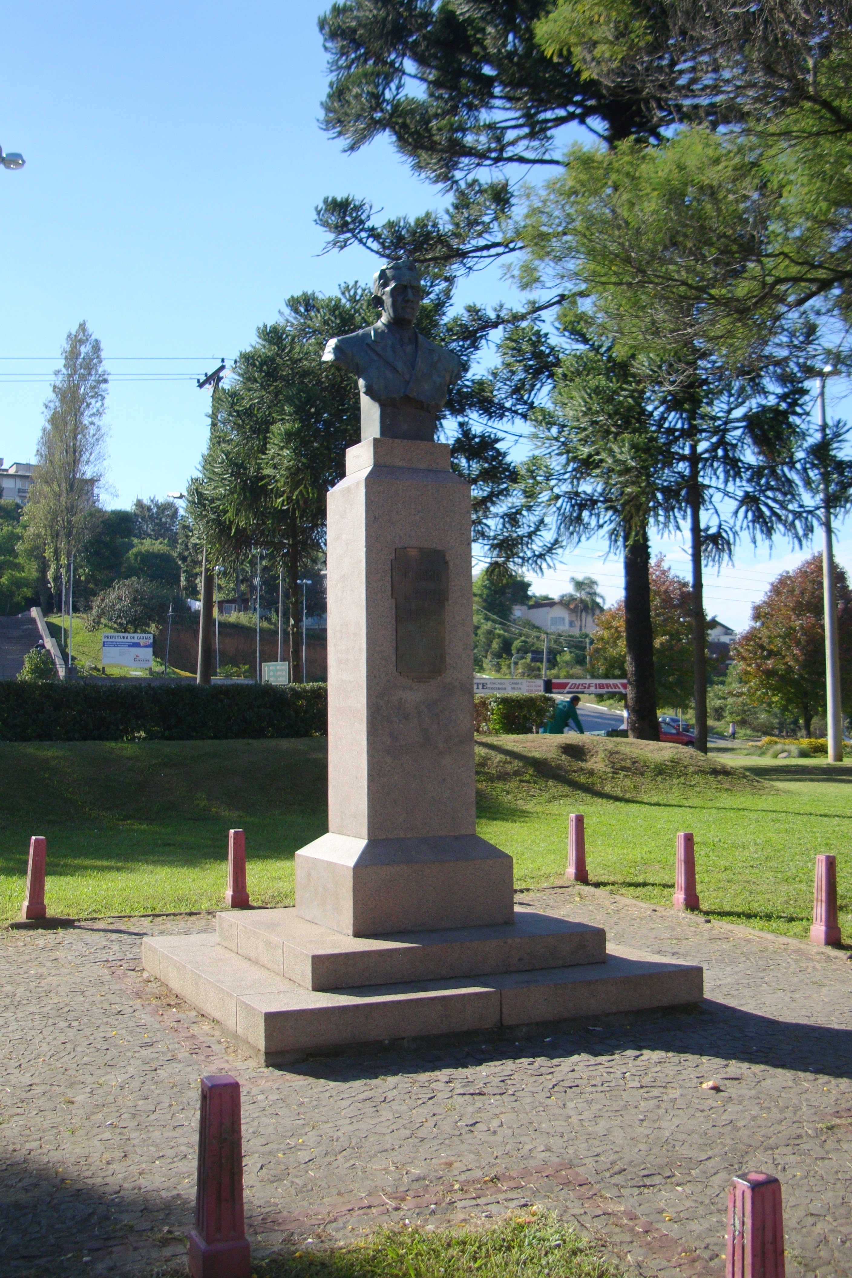 Busto de Abramo Eberle em Caxias do Sul